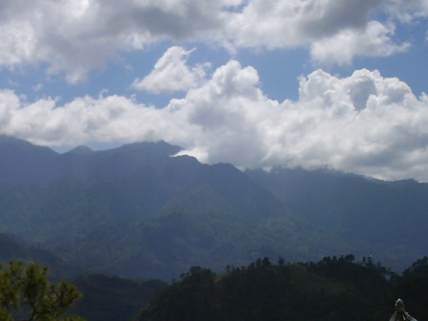 Vista de Celaque desde Talgua (Noroeste)